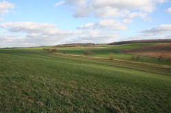 Im römischen Grund Nieder-Modau